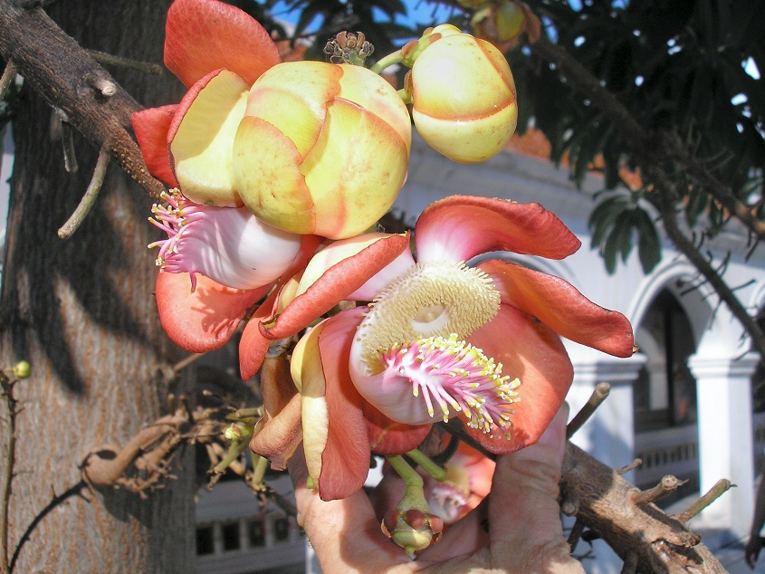 Kanonenkugelbaum in einer Tempelanlage in der Altstadt von Bangkok (Buanlangpoo)